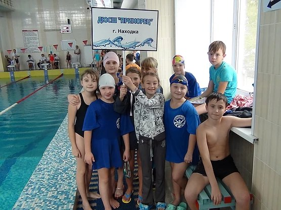 Команда ДЮСШ "Приморец" на открытом первенстве УГО по плаванию